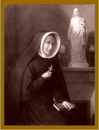 Photo du portrait de Madeleine-Sophie Barat, par Savinien Petit (1865)